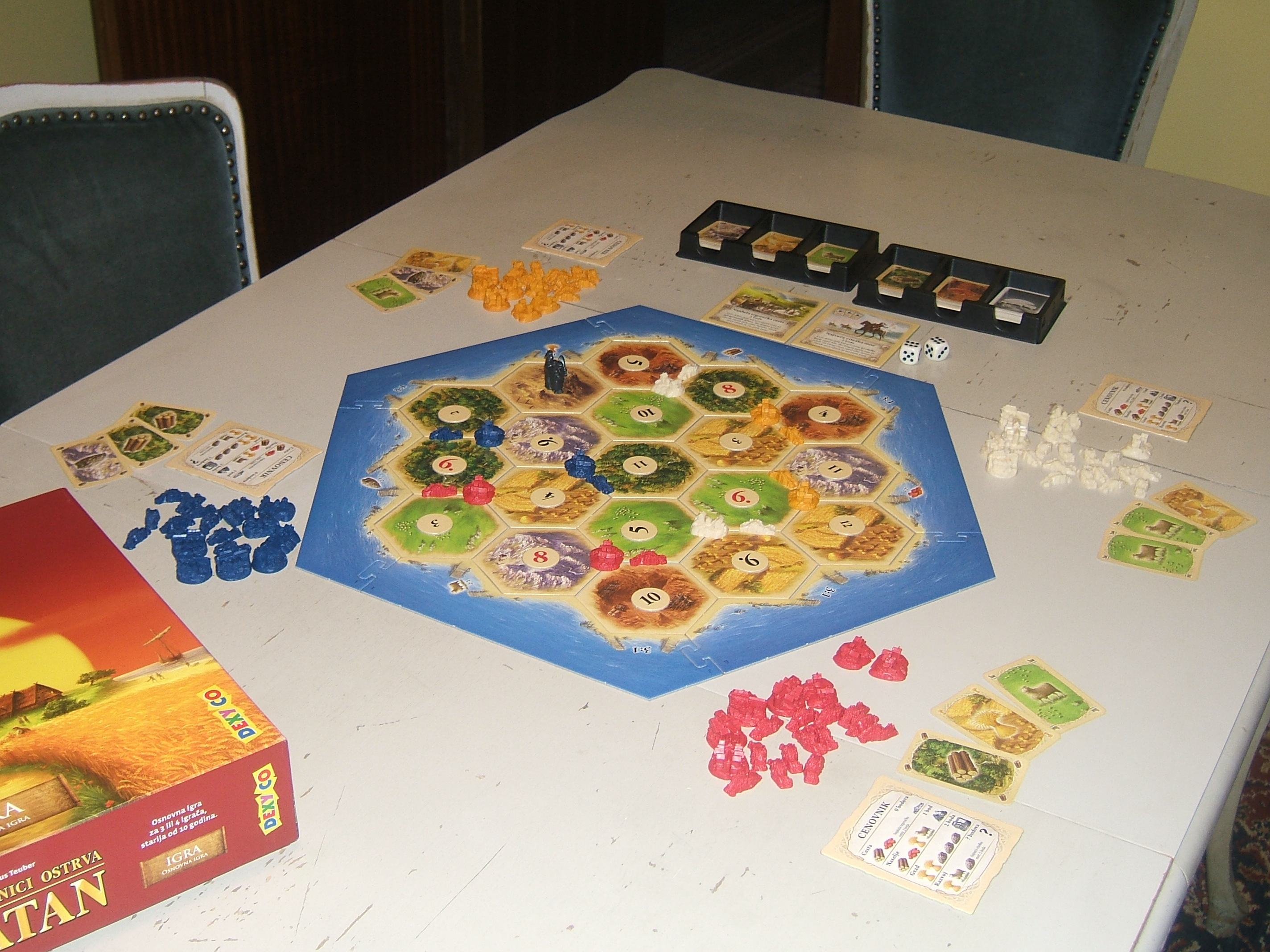 Postavka za igru u kojoj učestvuje četiri igrača.